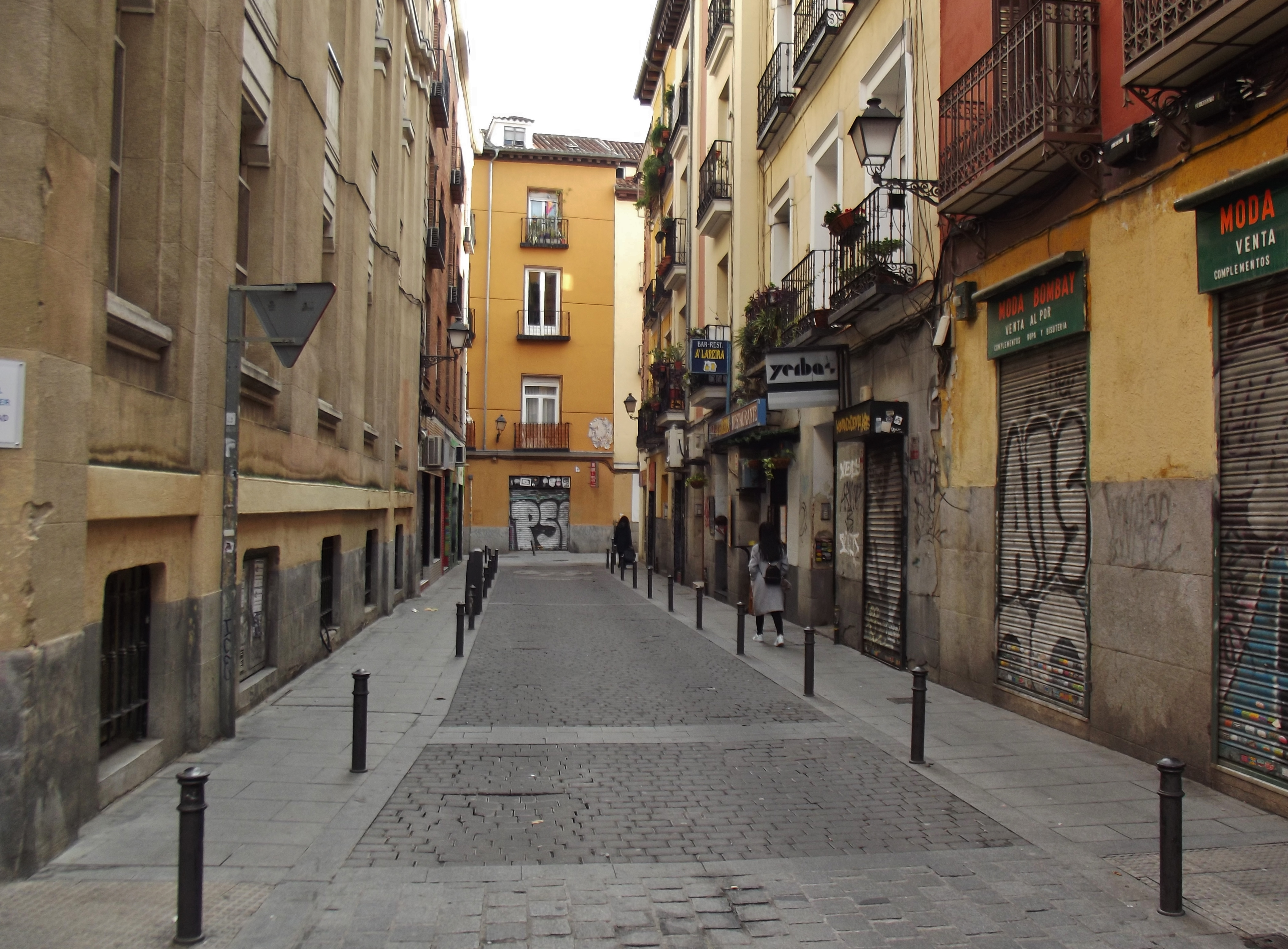 Calle de la Espada, Madrid.